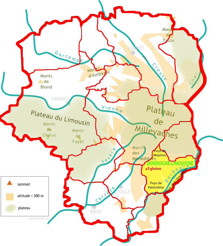 La Dordogne limousine sur la carte des pays traditionnels du Limousin